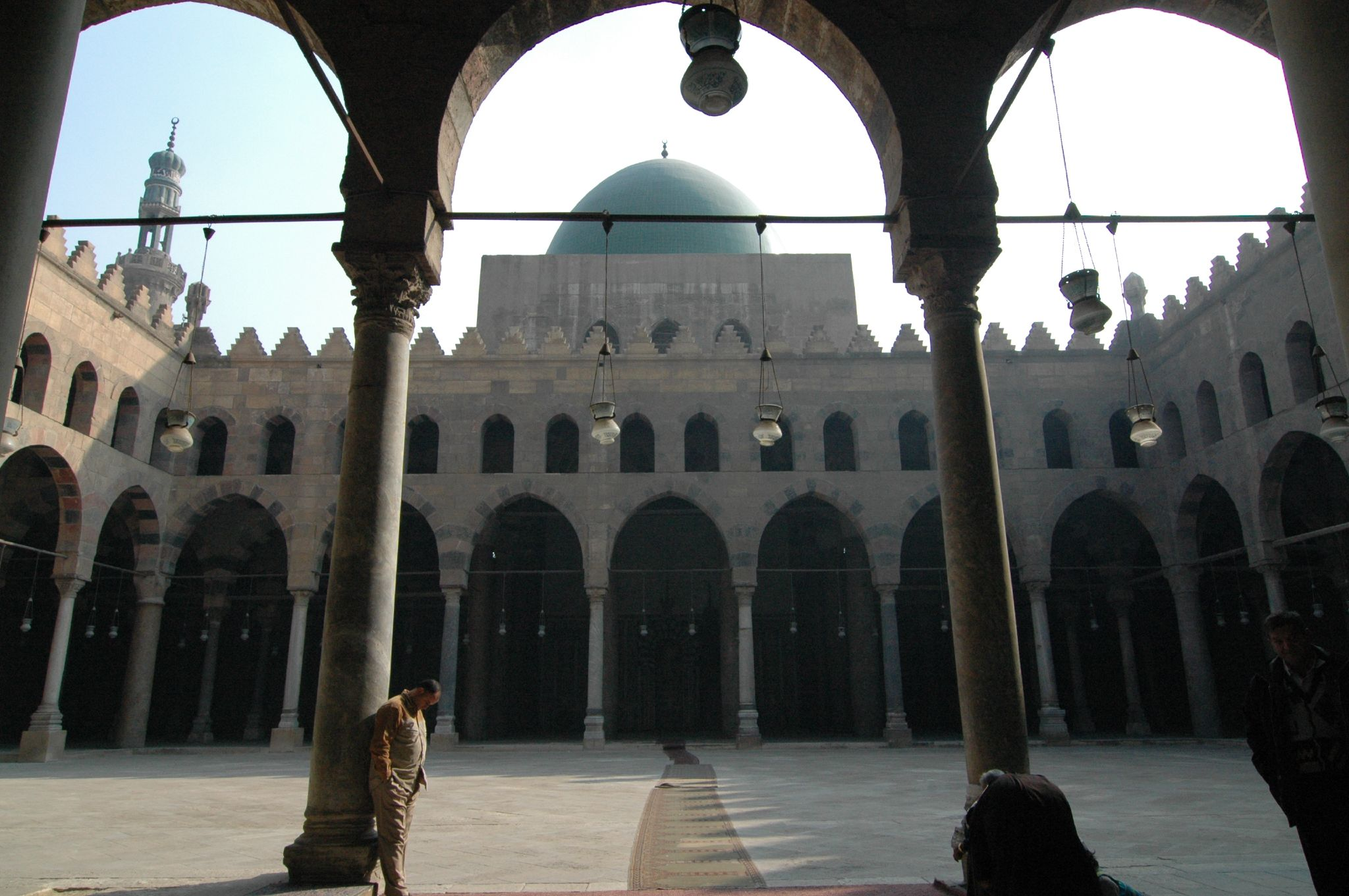 Cairo: moschea di en-Nasir Muhammad